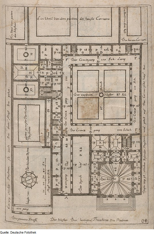 Original image description from the Deutsche Fotothek Architektur & Sakralbau & Kirche & Kloster & Grundriss